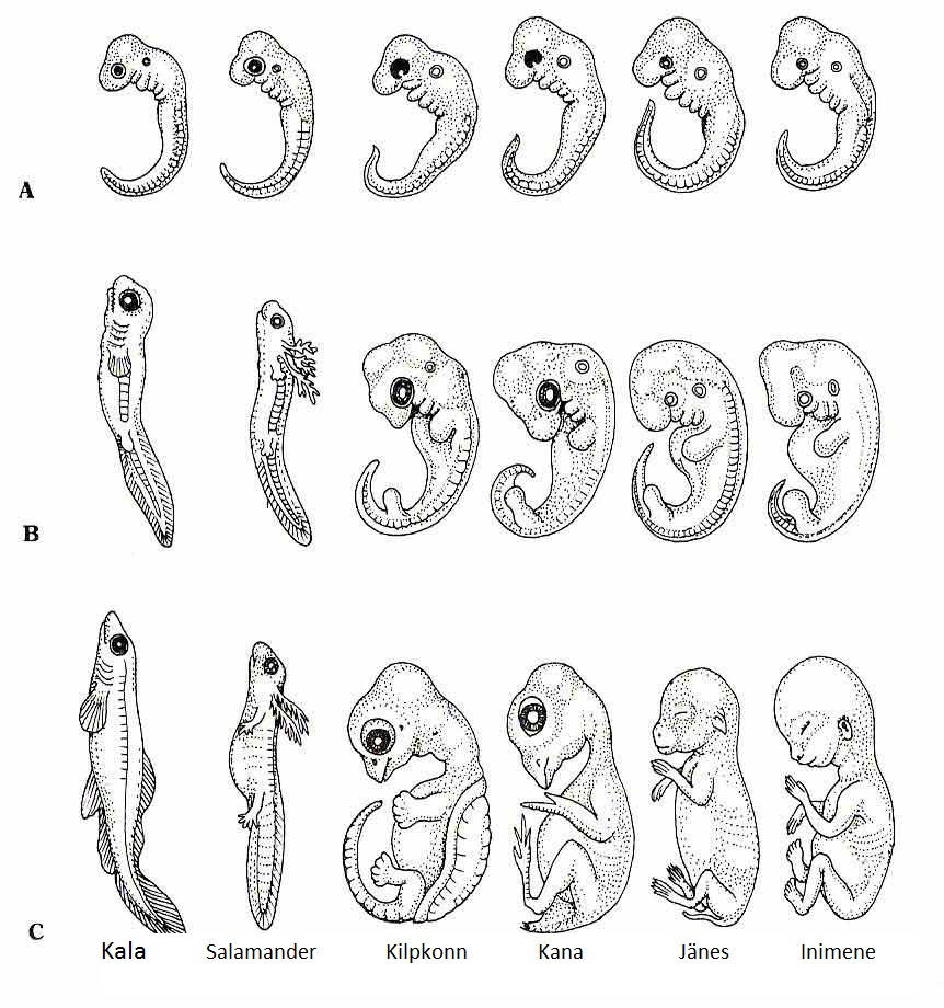 Embrüote võrdlus